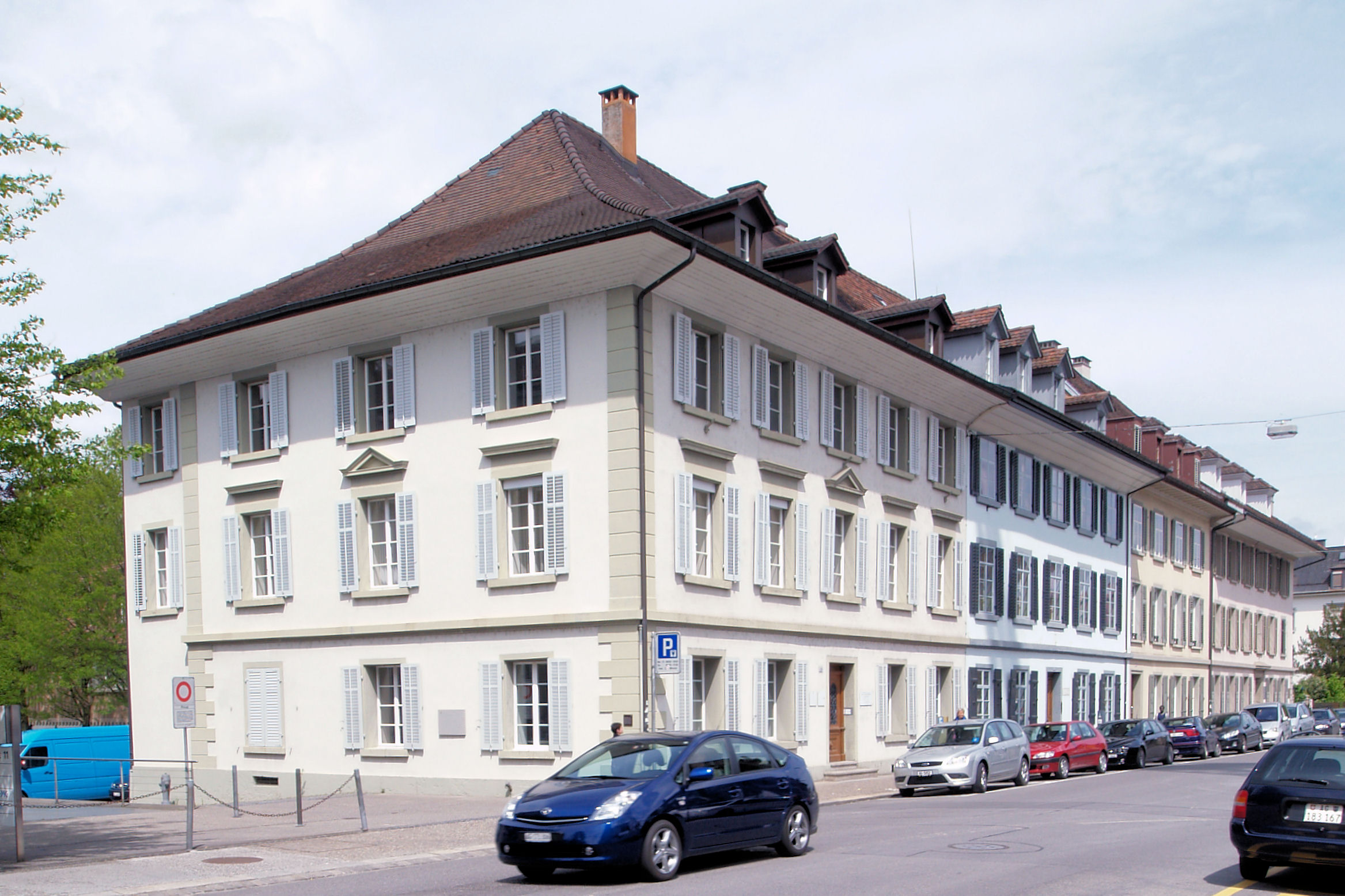 Die Neuen Häuser in Aarau, westlicher Häuserblock (Laurezenvorstadt 19-25).